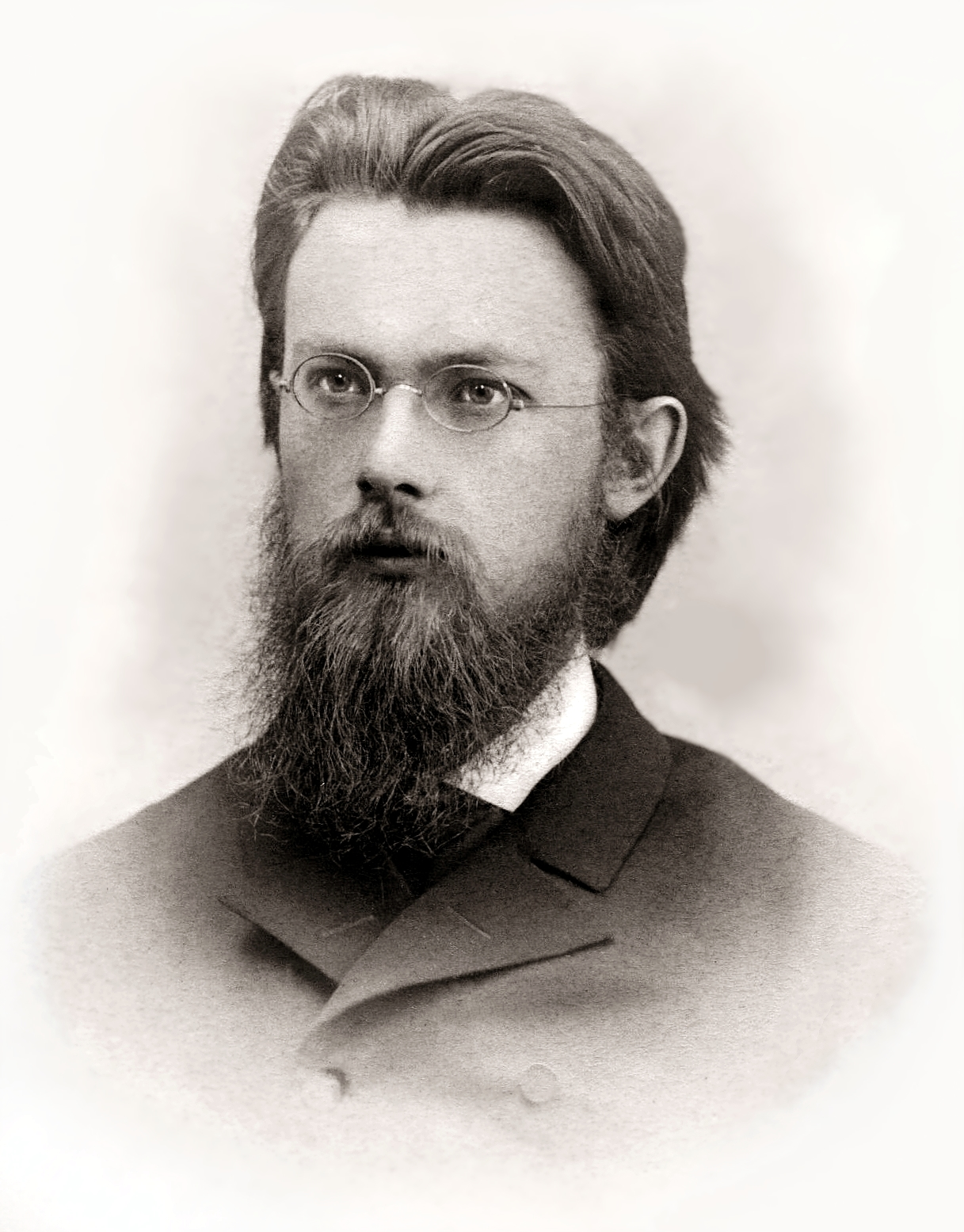 В. И. Вернадский во время стажировки в Париже.